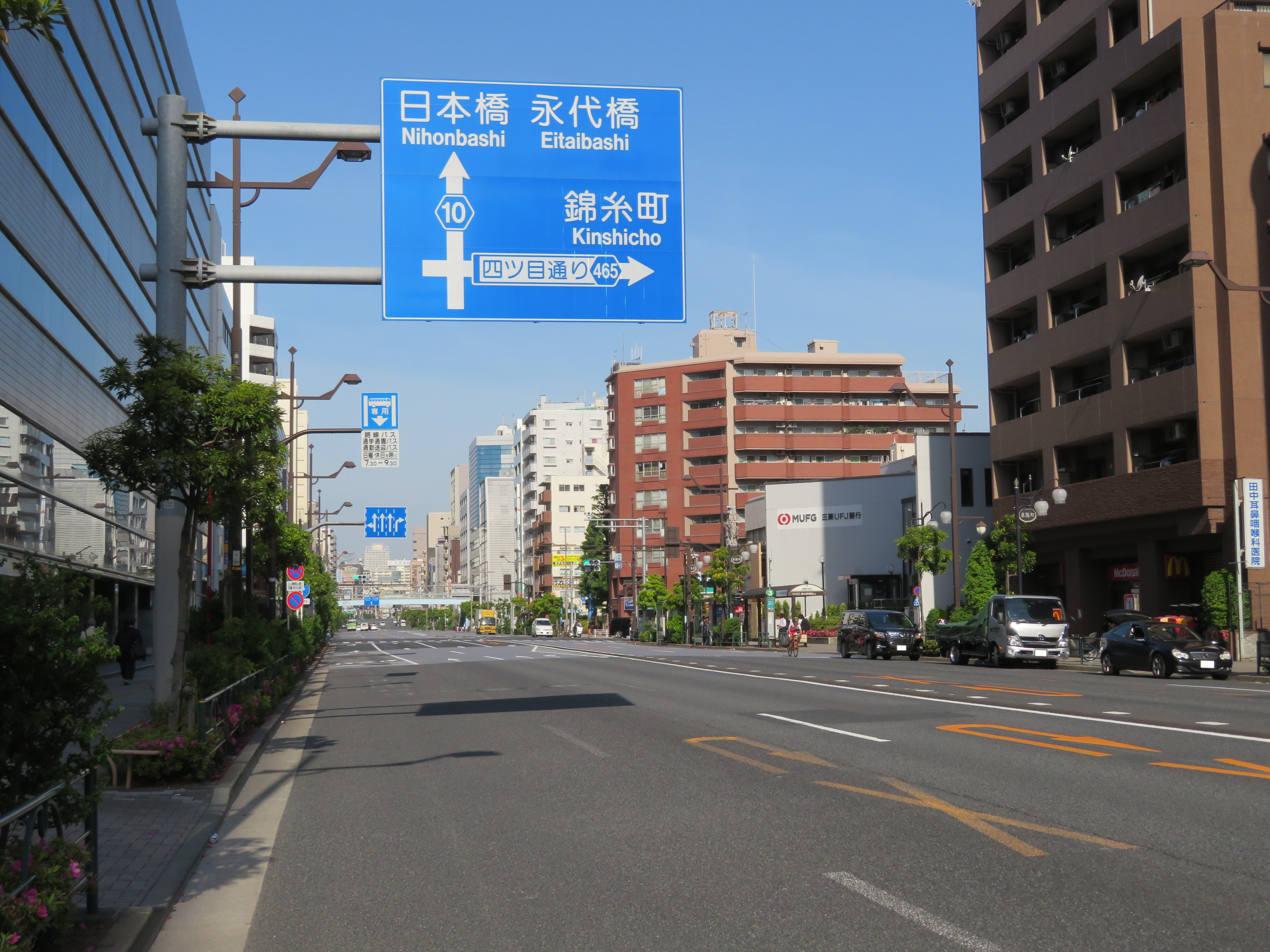 東京都道10号線（永代通り）江東区東陽町駅付近（日本橋方面を撮影） Canon PowerShot SX720 HS